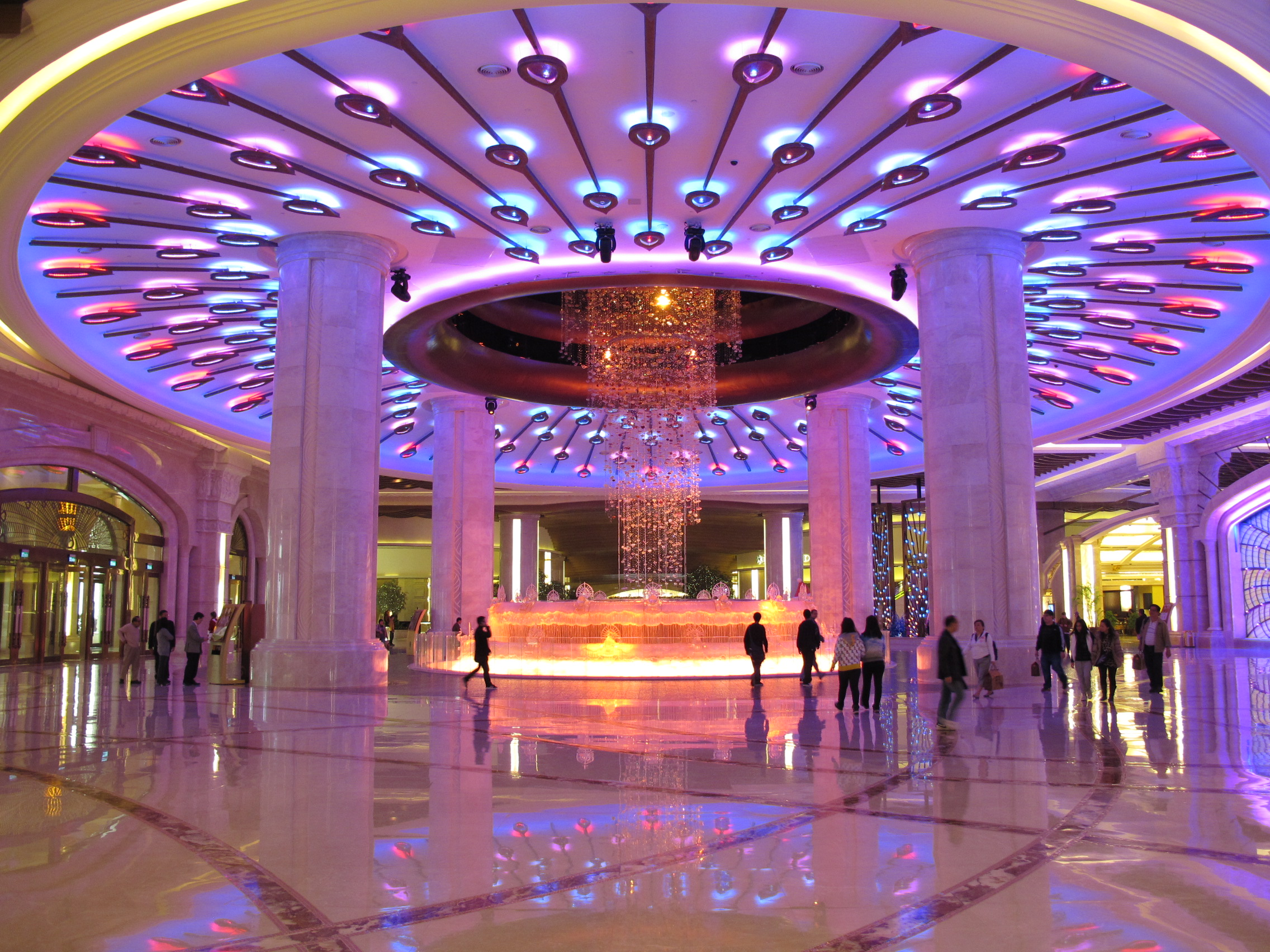 Galaxy Macau Main Lobby